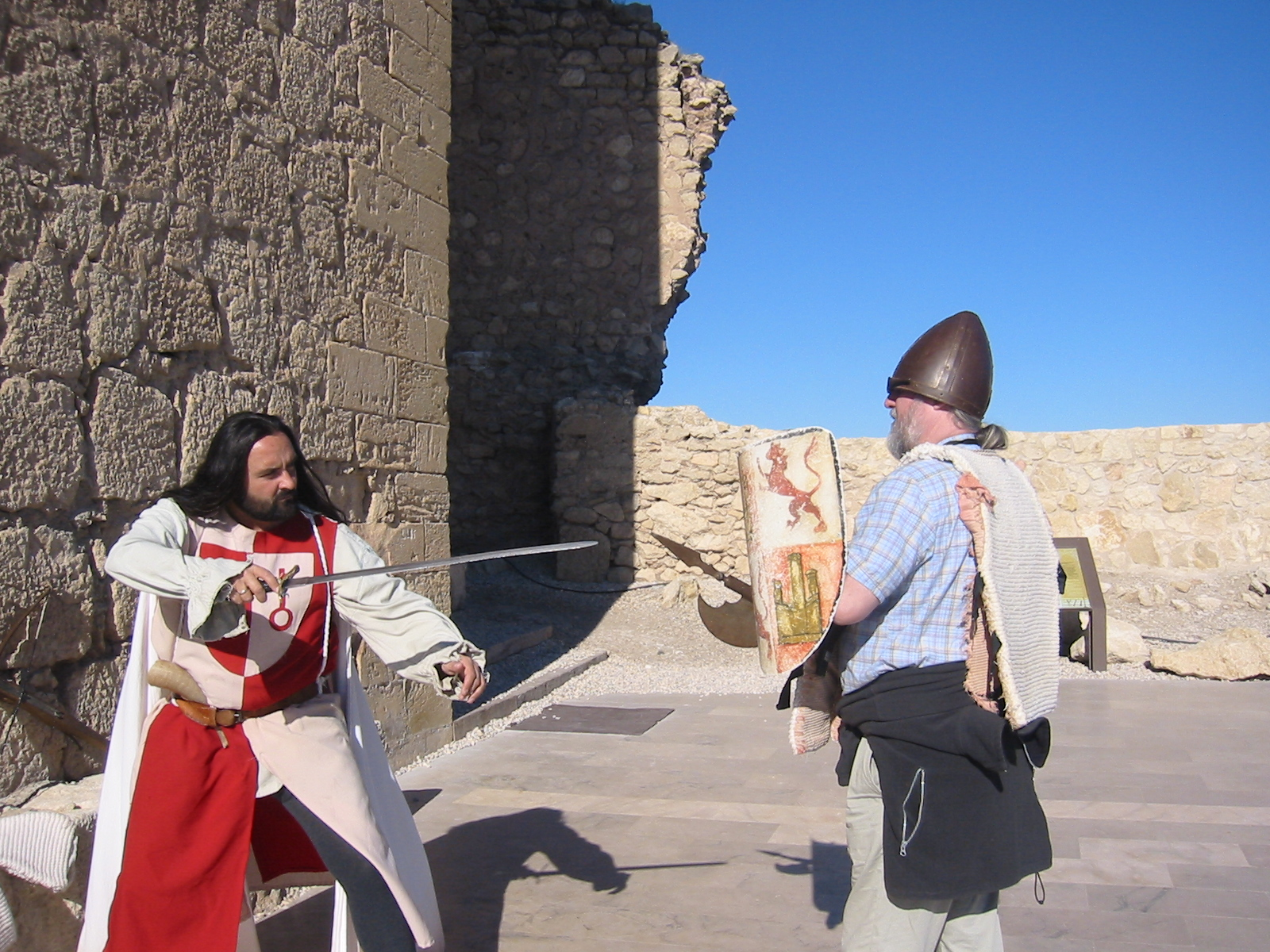 Original title: Andy and a Spanish re-enactor come to blows. Origianl description: Lorca Castle 2007. Representación medieval del parque temático Lorca Taller del Tiempo en el Castillo de Lorca (Murcia). Año 2007.